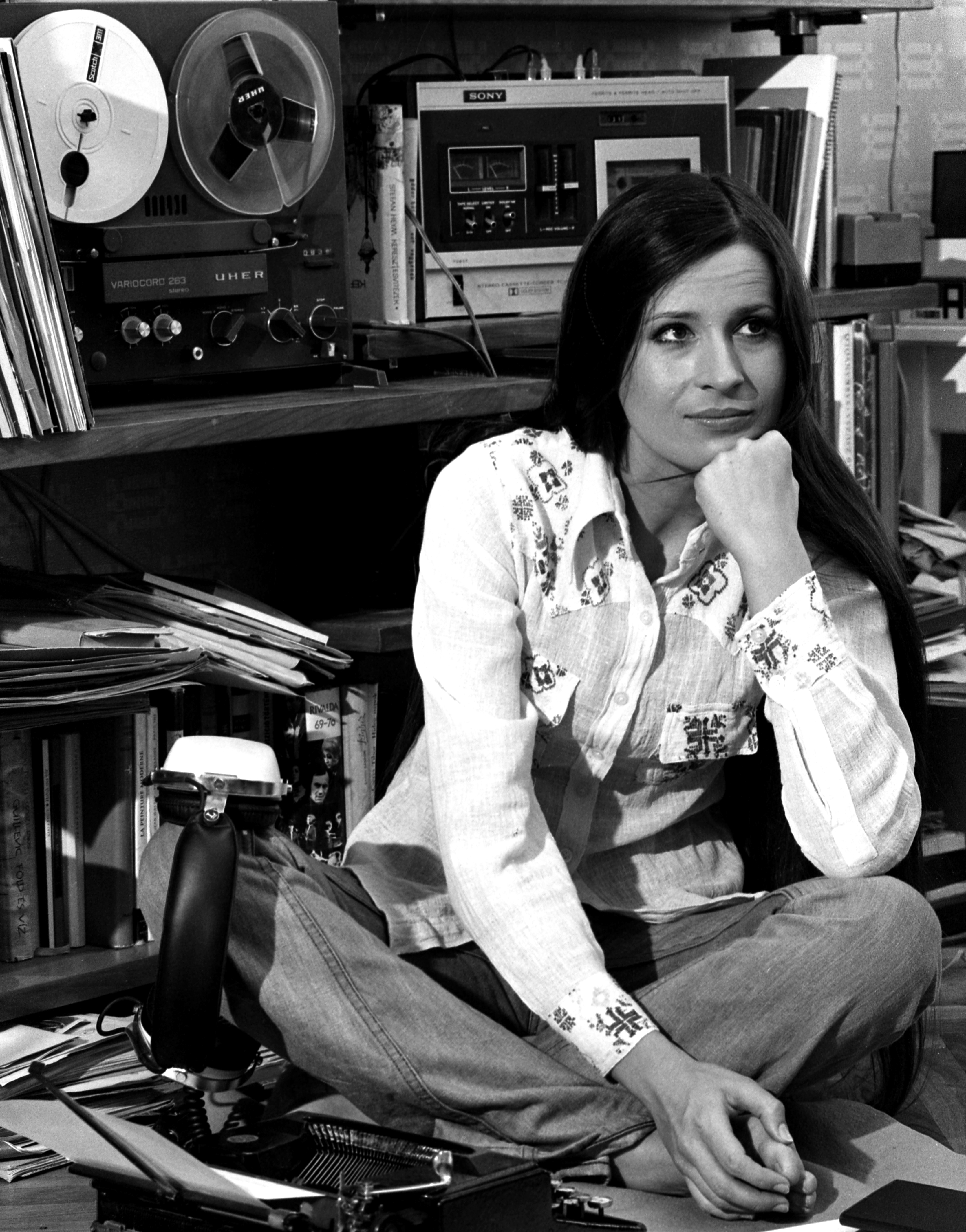 Koncz Zsuzsa (Pély, 1946. március 7. –) Kossuth-díjas és Liszt Ferenc-díjas magyar előadóművész, énekesnő.